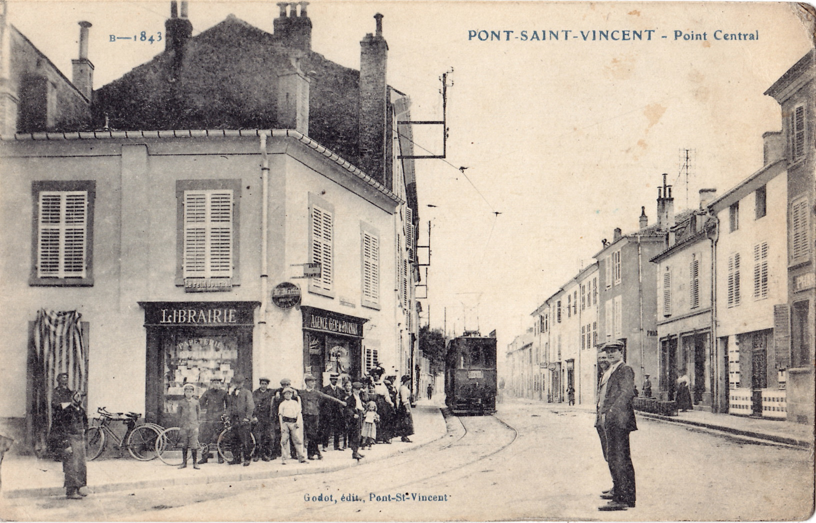 Carte postale ancienne éditée par Godat à Pont-Saint-Vincent : PONT-SAINT-VINCENT - Point central